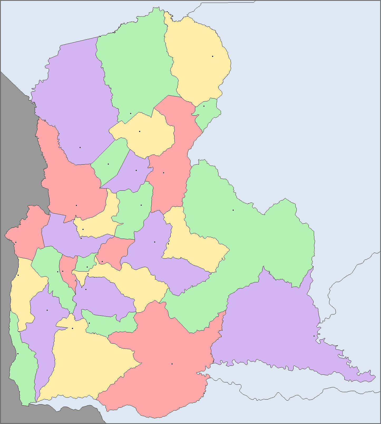 Localizador Municipios - Táchira